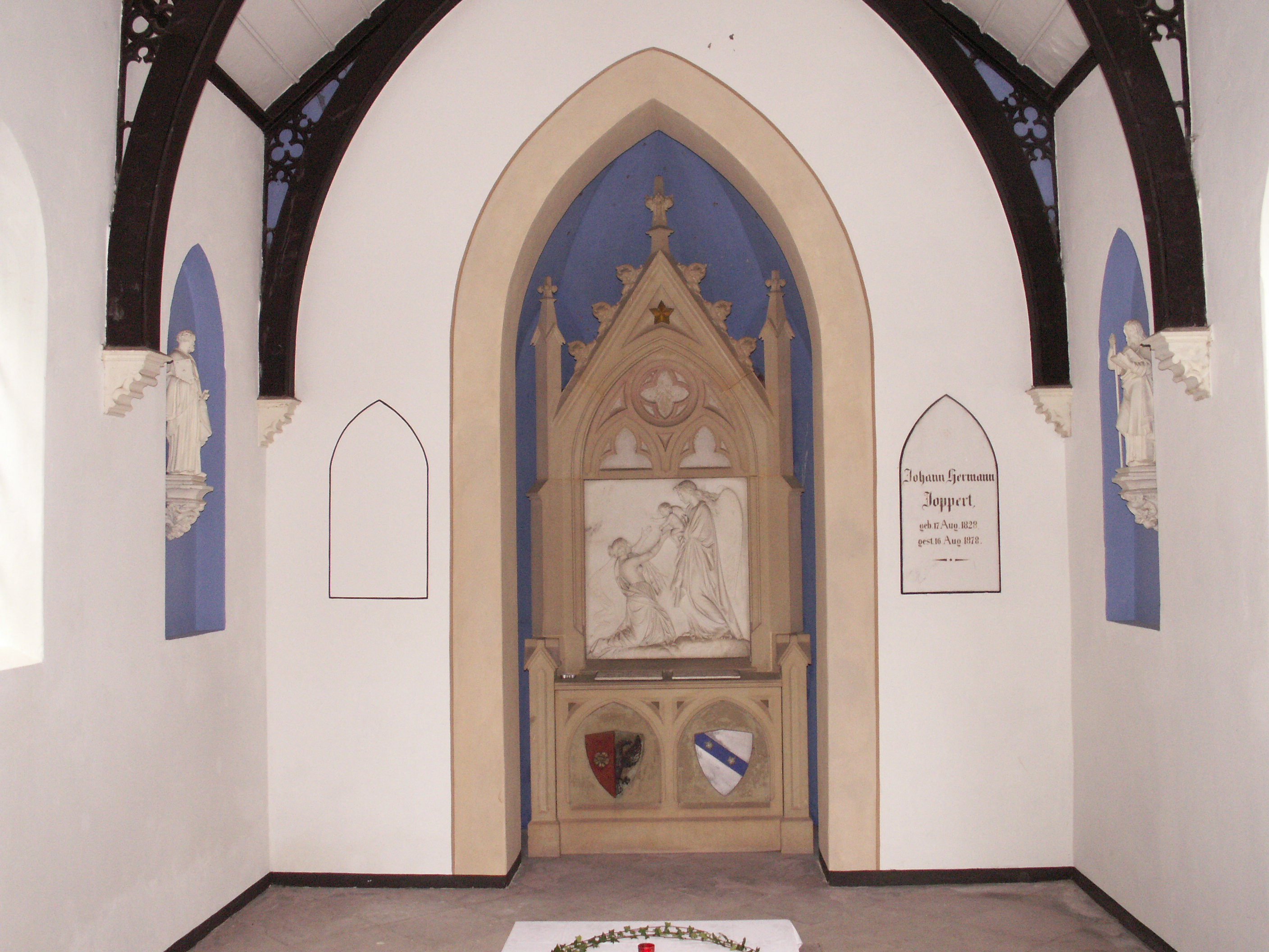 Innenansicht Mausoleum des Dichters Johann Hermann Joppert auf dem denkmalgeschützten Gartenfriedhof in D-27628 Rechtenfleth